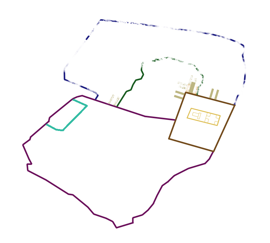 ירושלים 70 - חמישיית הסוללות האחרונות